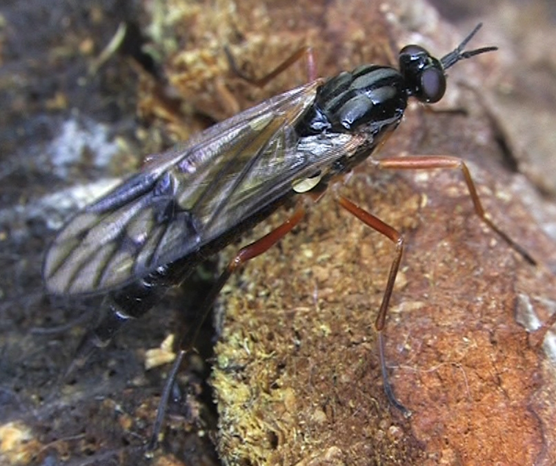 Xylophagus ater bei der Eiablage an einem Baumstumpf in einem Wald bei Marburg, Mittelhessen.